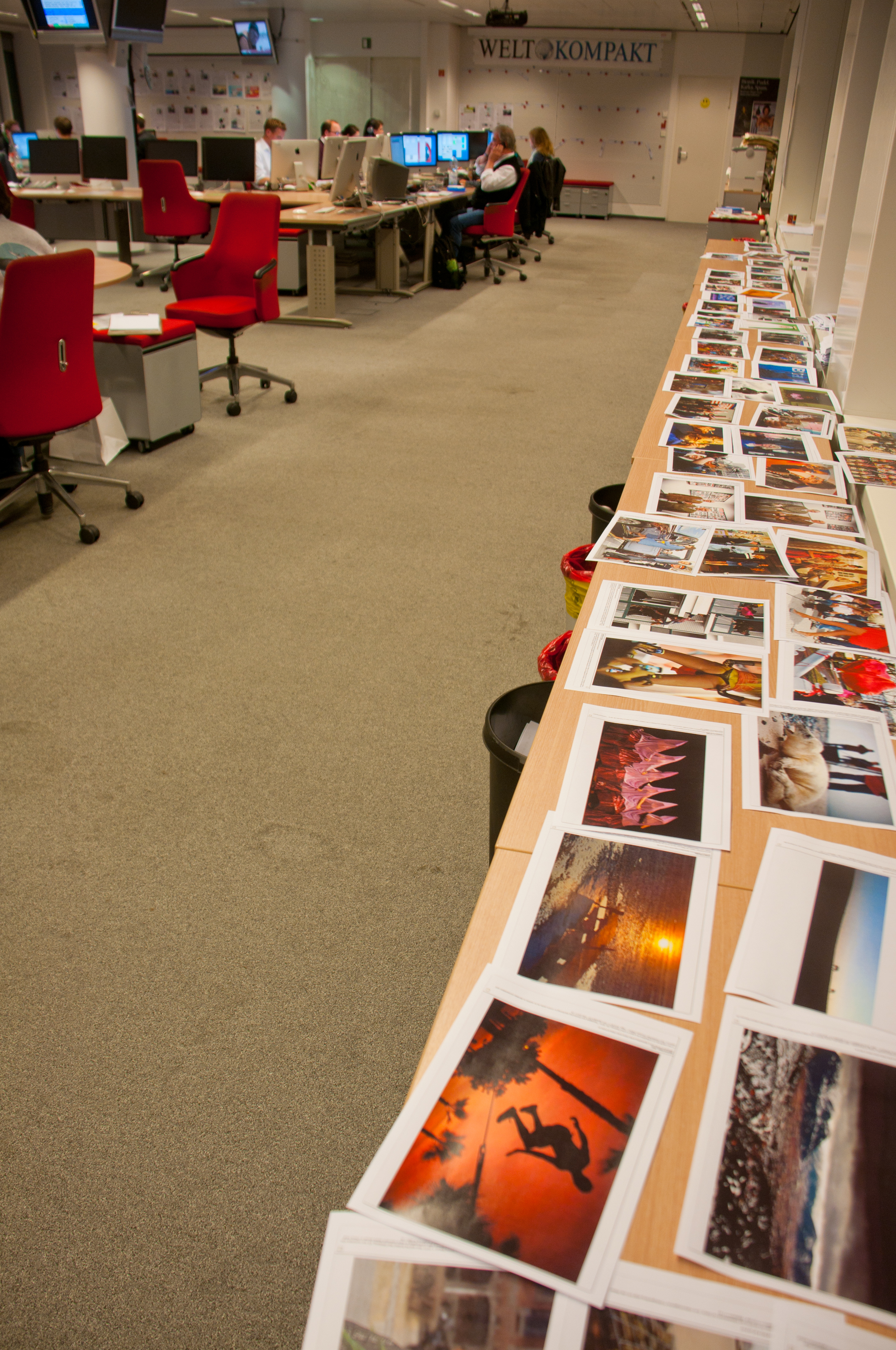 Wikipedia Stammtisch Berlin zu Besuch im Springer- Hochhaus